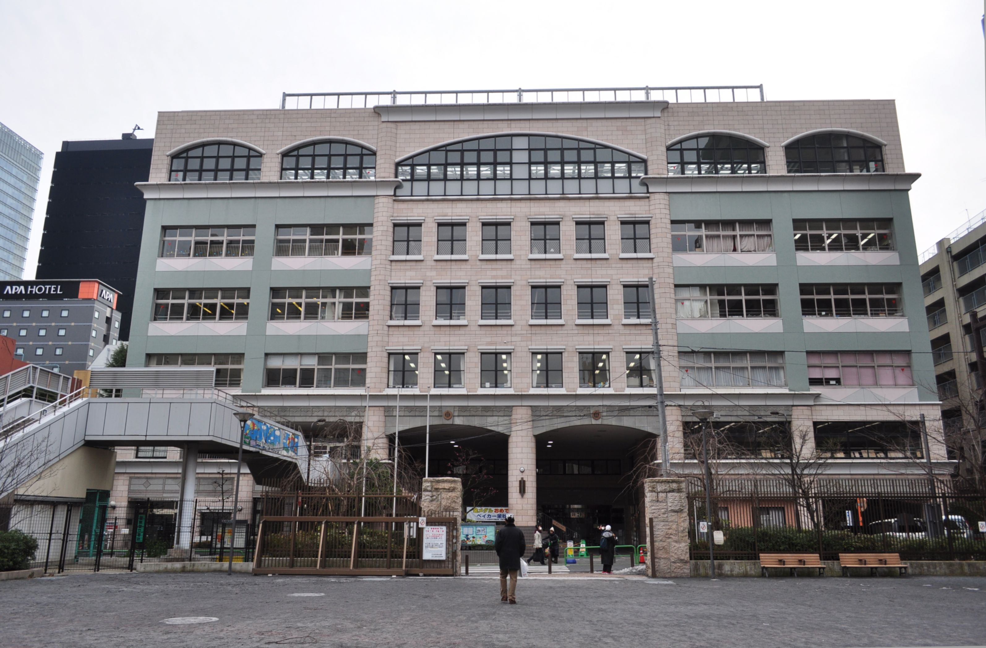 千代田区立昌平小学校 Nikon D5000